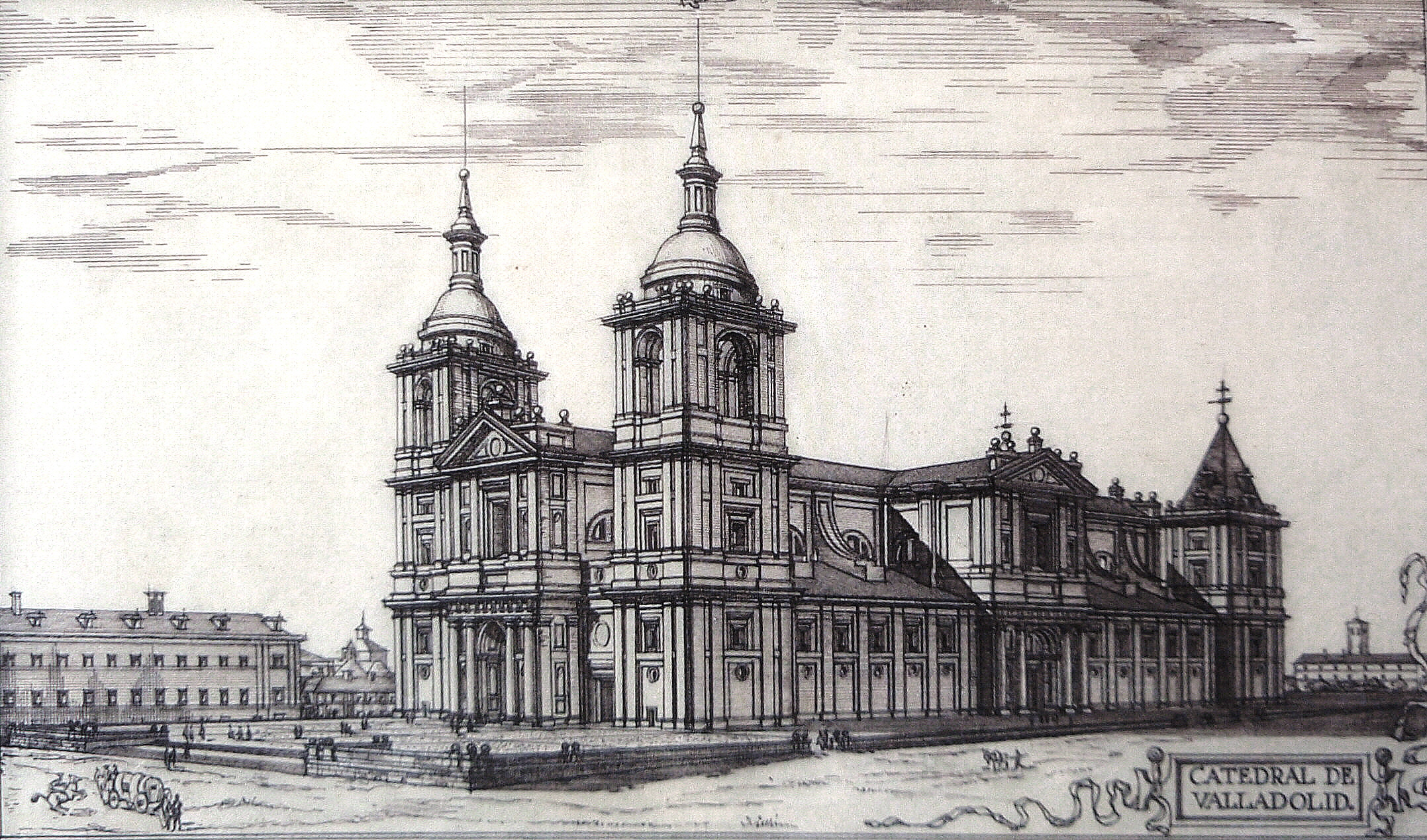 Dibujo del Proyecto ideal para Catedral de Valladolid (España) de Juan de Herrera, según Fernando Chueca Goitia.